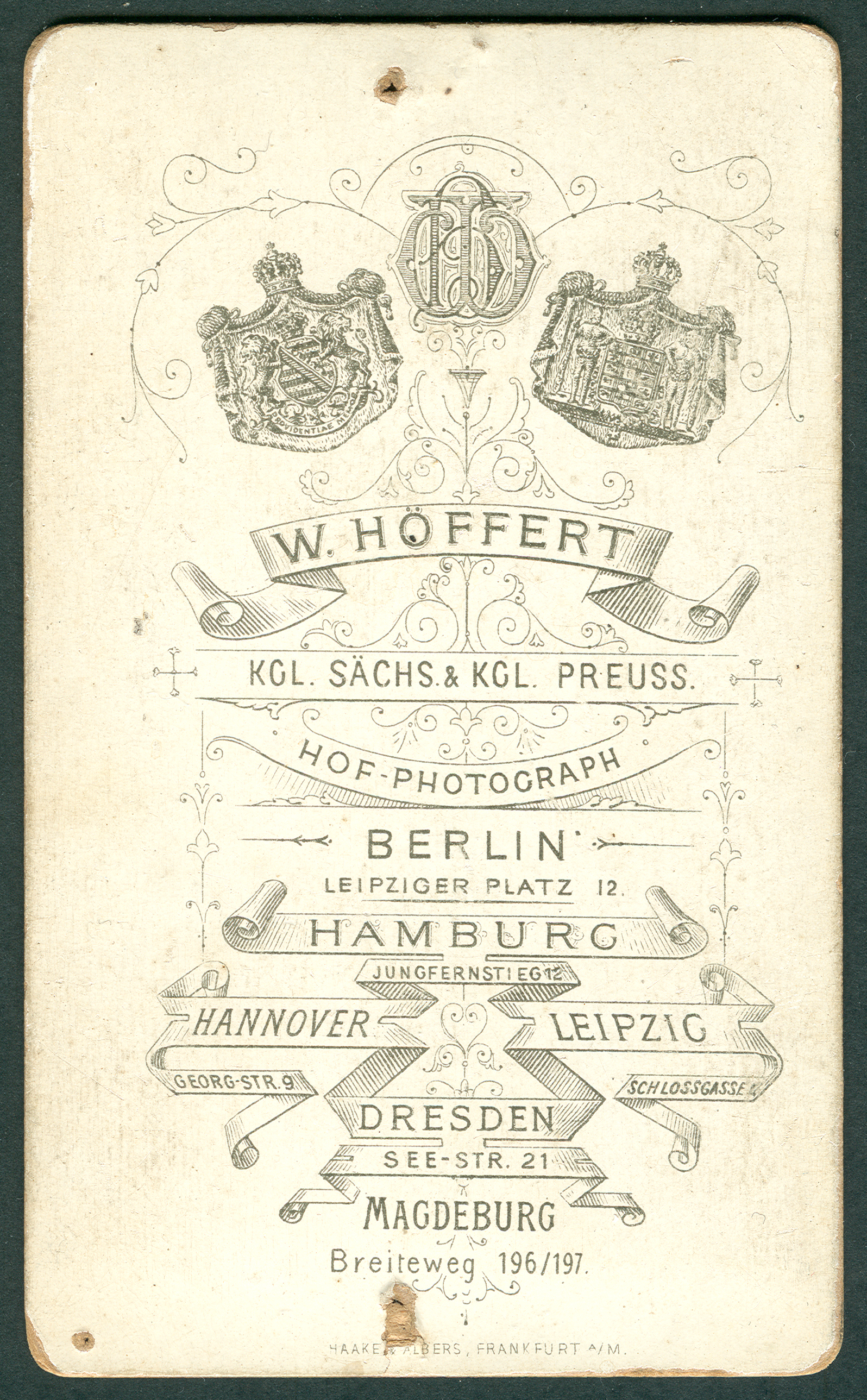 Revers der Carte des Visite von Wilhelm Höffert mit der Abbildung vermutlich eines jungen Matrosen (s. unten). Die aufwendige Gestaltung der Rückseite dieses Kartonträgers für das umseitige Foto informiert (von oben nach unten): Verschlungenes "W h" als Emblem für den Fotografen, daneben die Wappen der Königreiche von Sachsen und Preussen. Darunter W. Höffert, königlich preussischer und königlich sächsischer Hof-Photograph. Adressen: Berlin, Leipziger Platz 12; Hamburg, Jungfernstieg 12; Hannover, Georgstraße 9; Leipzig, Schlossgasse 4; Dresden, Seestraße 21 und Magdeburg, Breiteweg 196/197. Ganz unten der Zudruck Haake & Albers, Frankfurt am Main", die diesen Kartonträger wohl speziell für den Hoffotografen vertrieben.